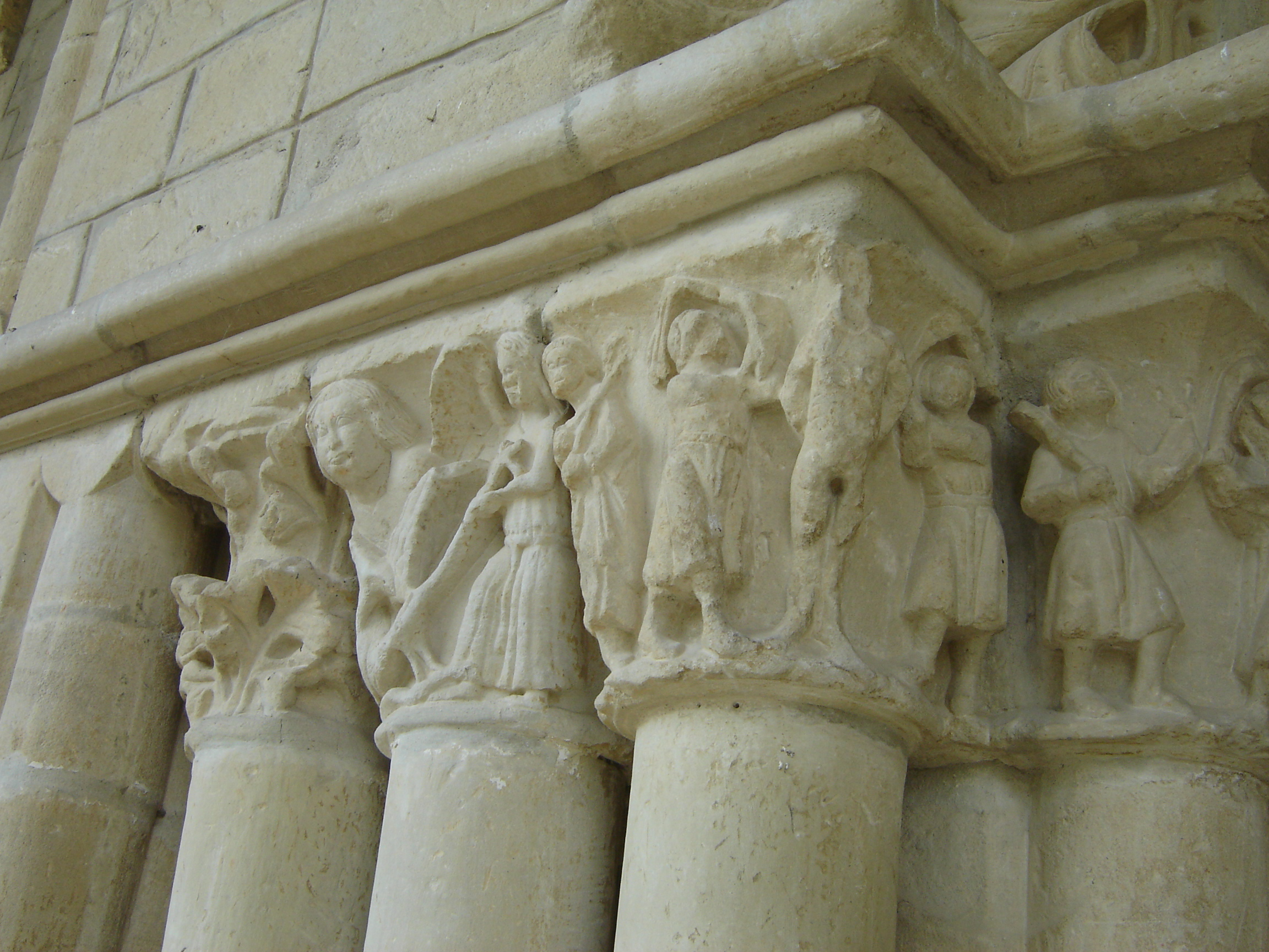 Detalle de capiteles de la Iglesia de la Asunción de Nuestra Señora de Tuesta